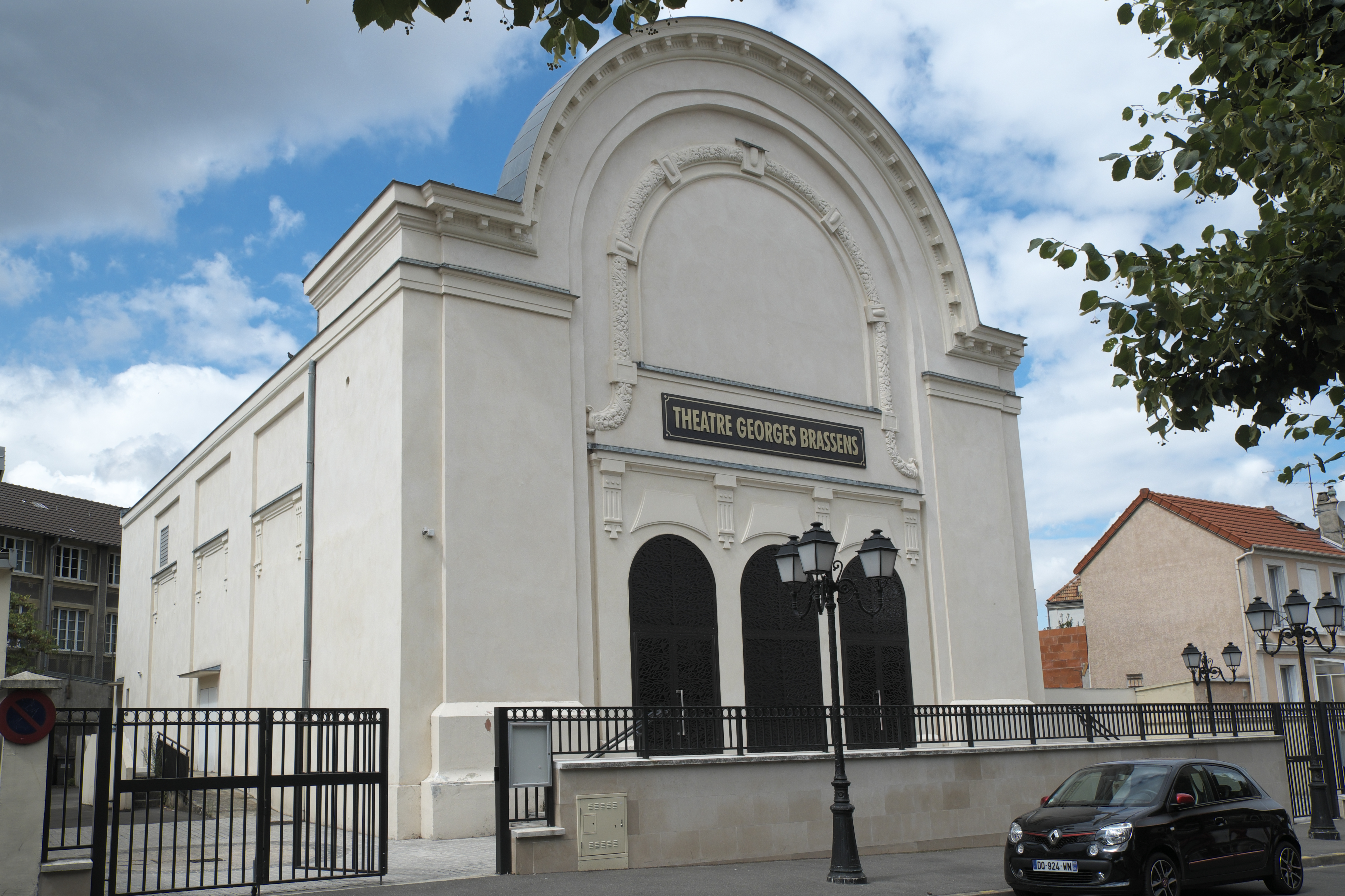 Théâtre Georges Brassens in Villemomble im Département Seine-Saint-Denis (Île-de-France/Frankreich)